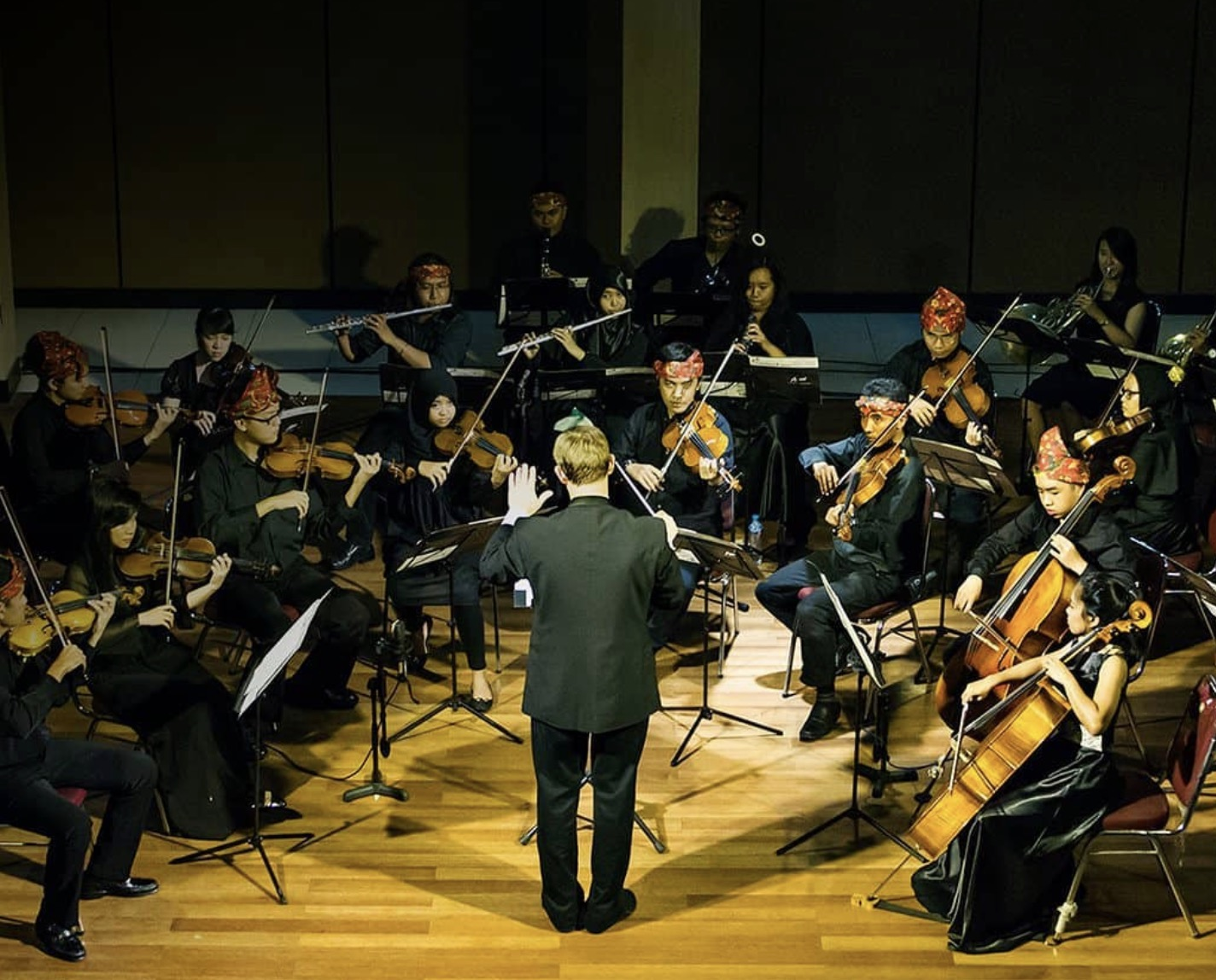 Konser Pertama Bandung Philharmonic pada 18 Januari 2016 di Gedung Padepokan Seni Mayang Sunda, Bandung.